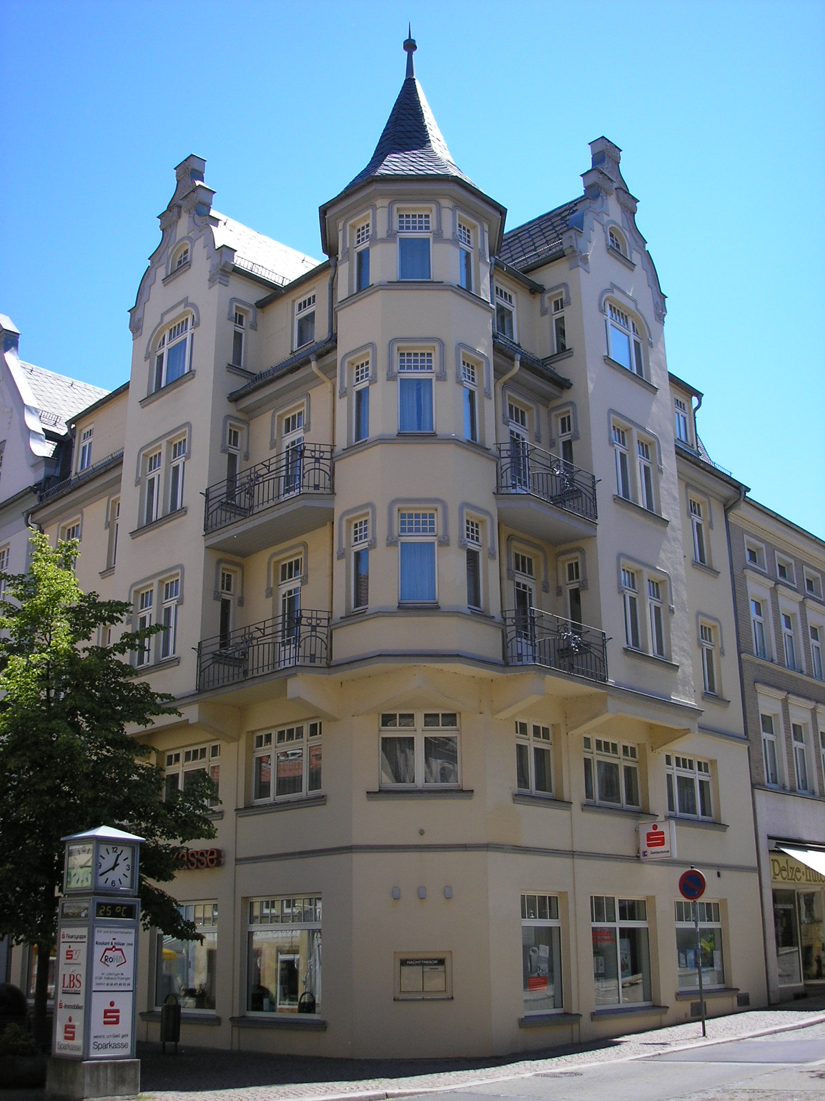 In der Pößnecker Innenstadt.